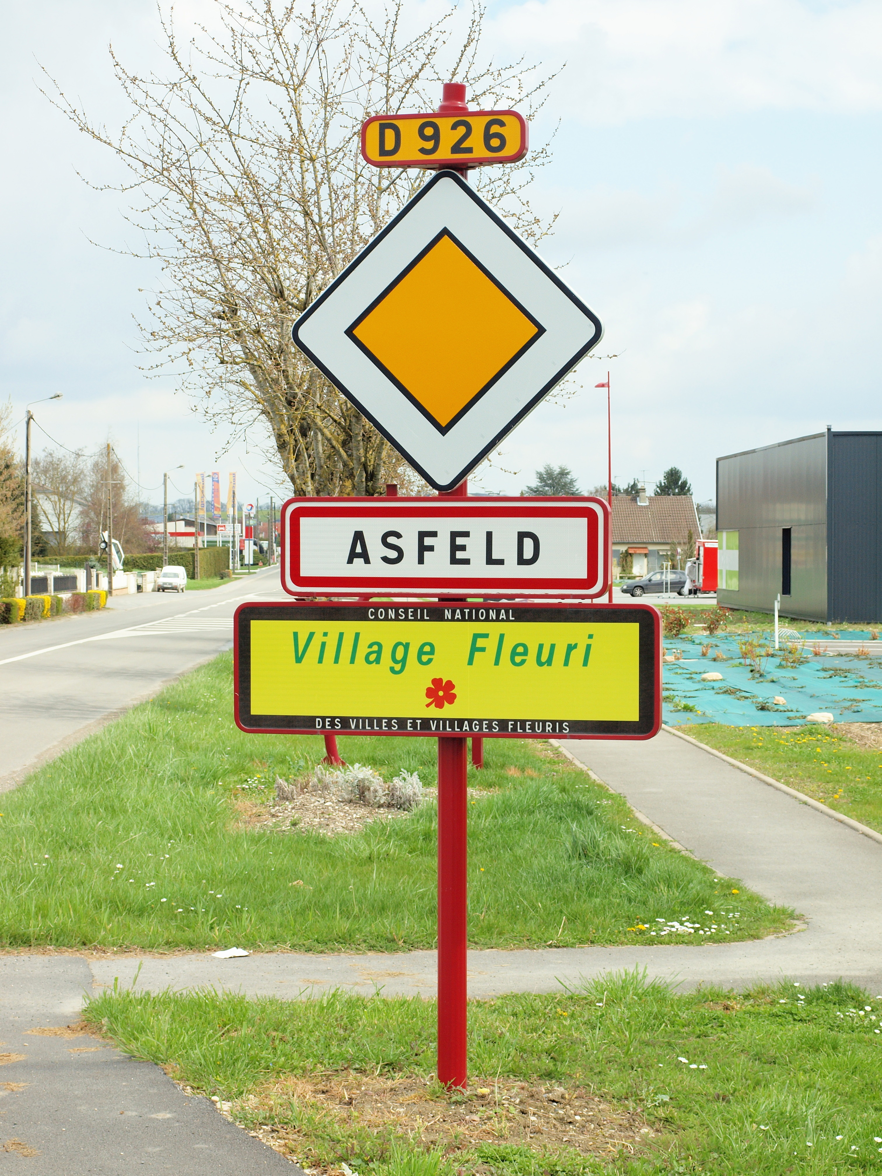 Asfeld (Ardennes, France)